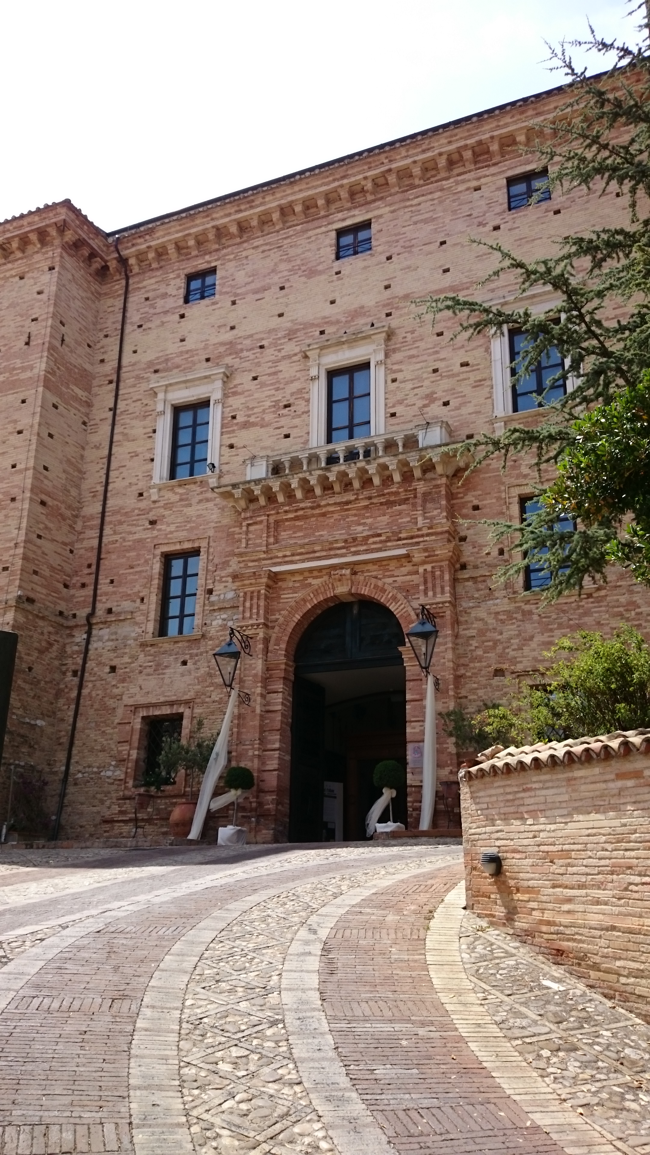 Loreto Aprutino